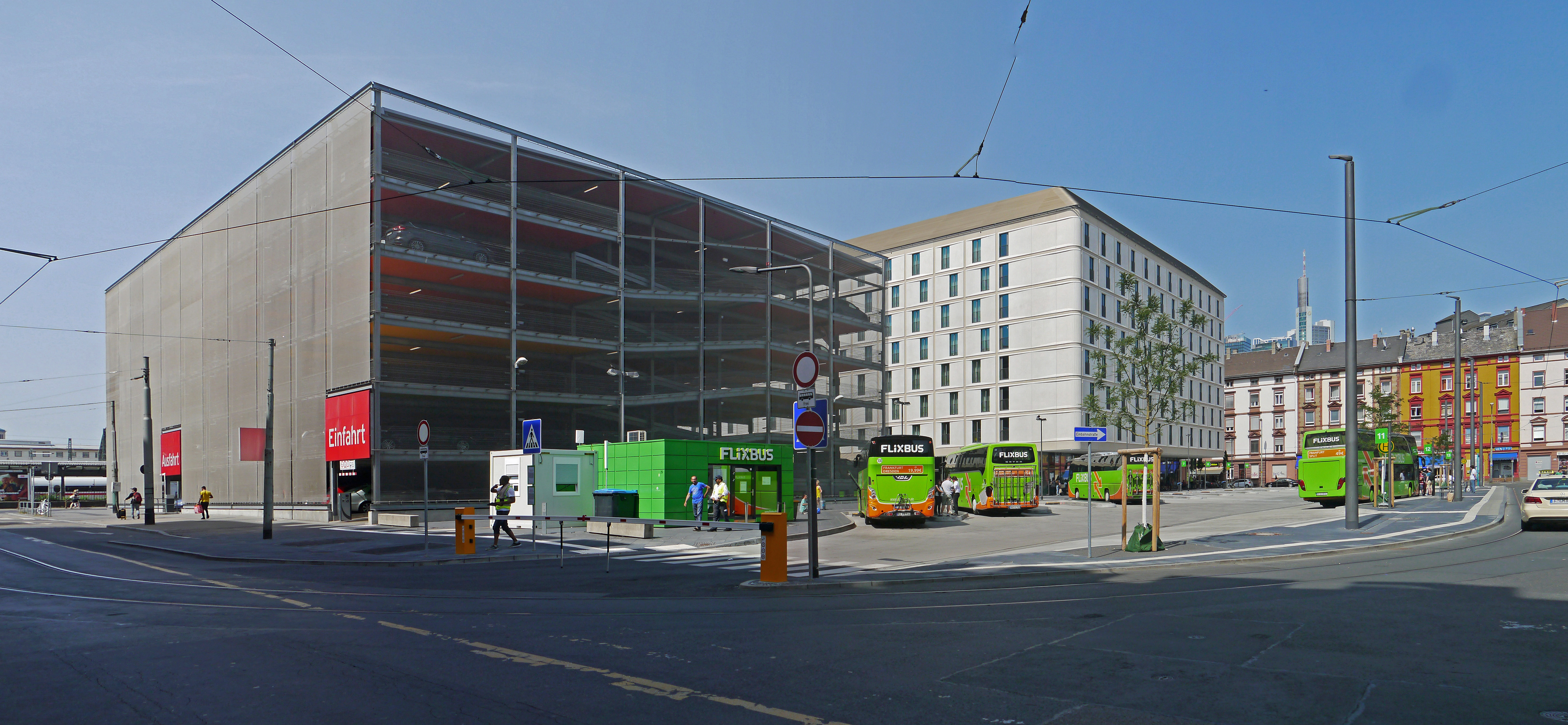 Der Fernbusbahnhof, in der Stuttgarter Straße in Frankfurt am Main (Gutleutviertel); im Juni 2019 nach Abschluss des ersten Bauabschnitts mit 14 Bushaltebuchten und dem Kartenverkaufscontainer.